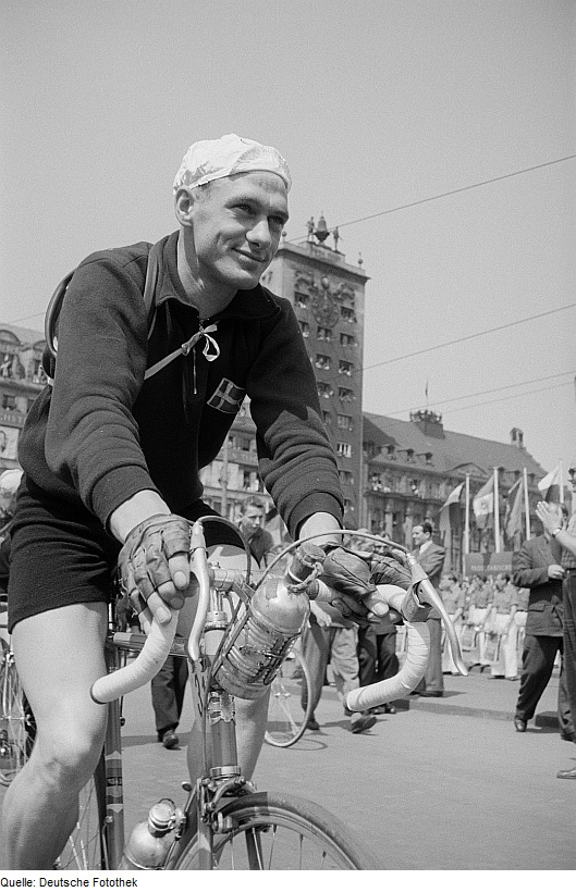 Original image description from the Deutsche Fotothek Bild 31 Eluf Dalgaard